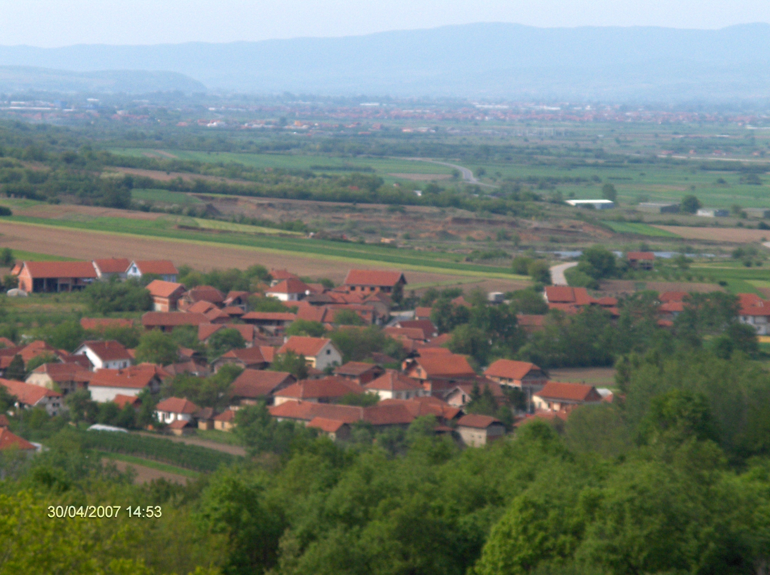 Mala Grabovnica je naselje u opštini Leskovac. Zajedno sa Velikom Grabovnicom i naseljem Dobrotin čini jedinstvenu antropogeografsku sredinu. autor slike Dejan Ilić Matkin.